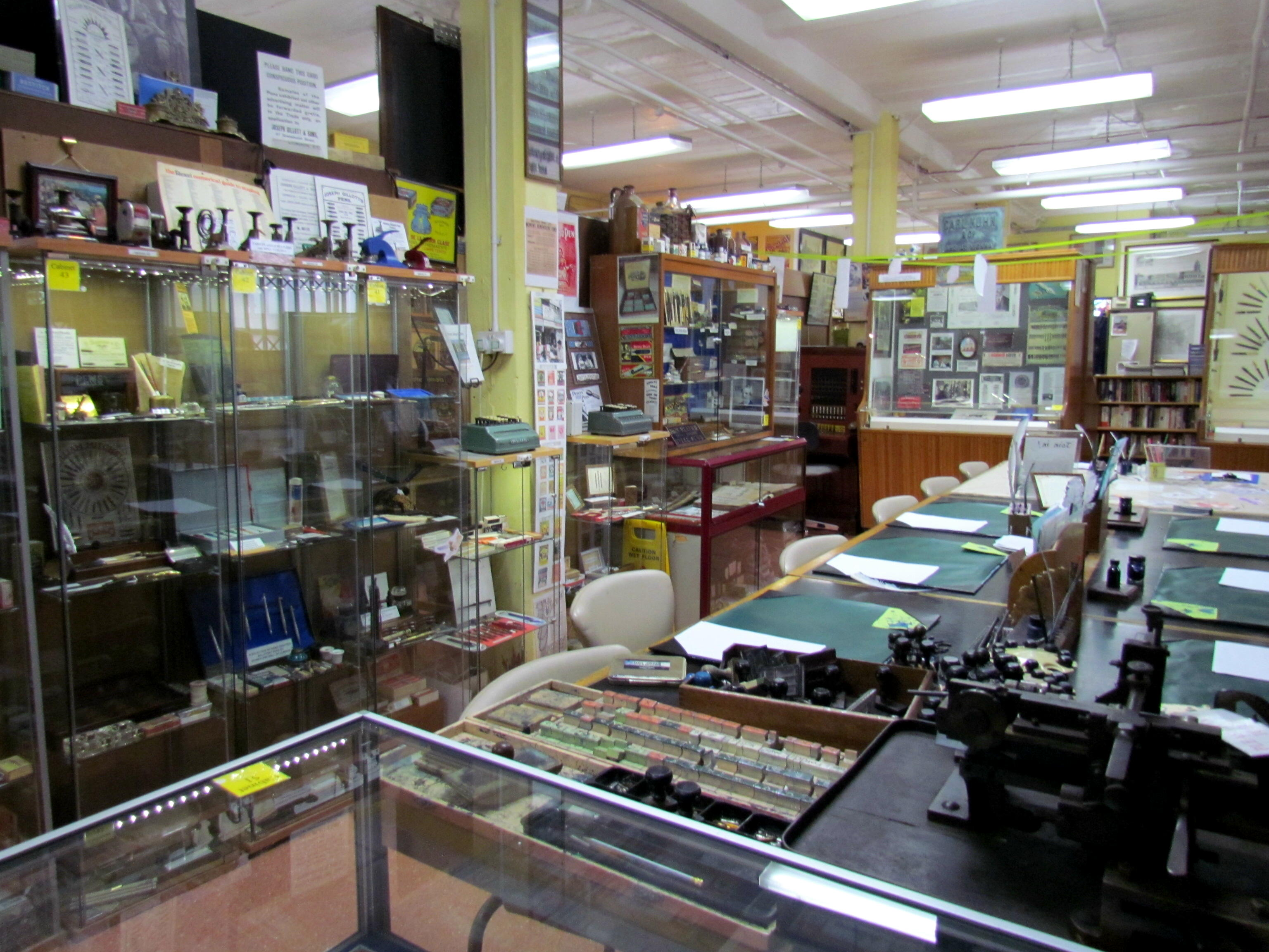 Pen Museum